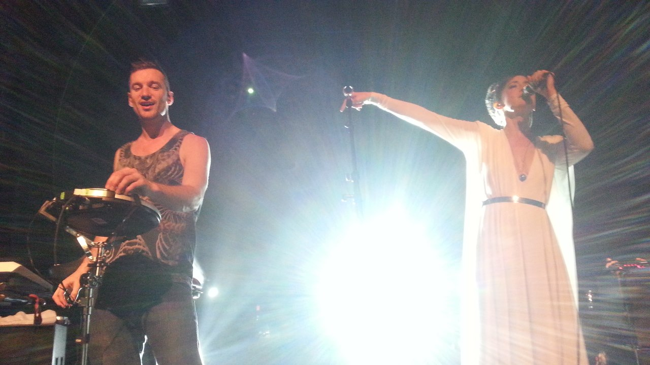 הצמד המוזיקלי הבריטי "לם" בהופעה חיה בברלין, ב30 לנובמבר 2014.